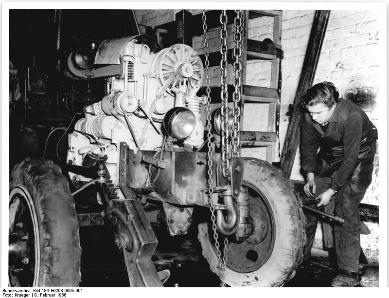 Reparatur eines Traktors Zentralbild Krueger krue-zi 8.2.1966 Eine Reparatur an der Vorderachse...die Landmaschinenschlosser Hans-Joachim Timm hier ausführt, gehört mit zu den Instandsetzungsarbeiten an diesem Ackerschlepper 1430"Famulus". Die Kollegen der station für Landtechnik in Werneuchen, Kreis Bernau, haben alle Hände voll zu tun, um die Traktoren für die Frühjahrsarbeiten wieder einsatzbereit zu machen. Sie haben sich auf die Reparatur des "Famulus" und auf Kettenschlepper spezialisiert.